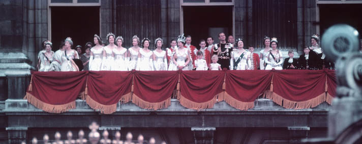 Title / Titre : Coronation of Queen Elizabeth II / Couronnement de la Reine Elizabeth II Creator(s) / Créateur(s) : Unknown / Inconnu Date(s) : June 2, 1953 / 2 juin 1953 Reference No. / Numéro de référence : MIKAN 3242152 Location / Lieu : London, England / London, Angleterre Credit / Mention de source : Library and Archives Canada, K-0000046 / Bibliothèque et Archives Canada, K-0000046